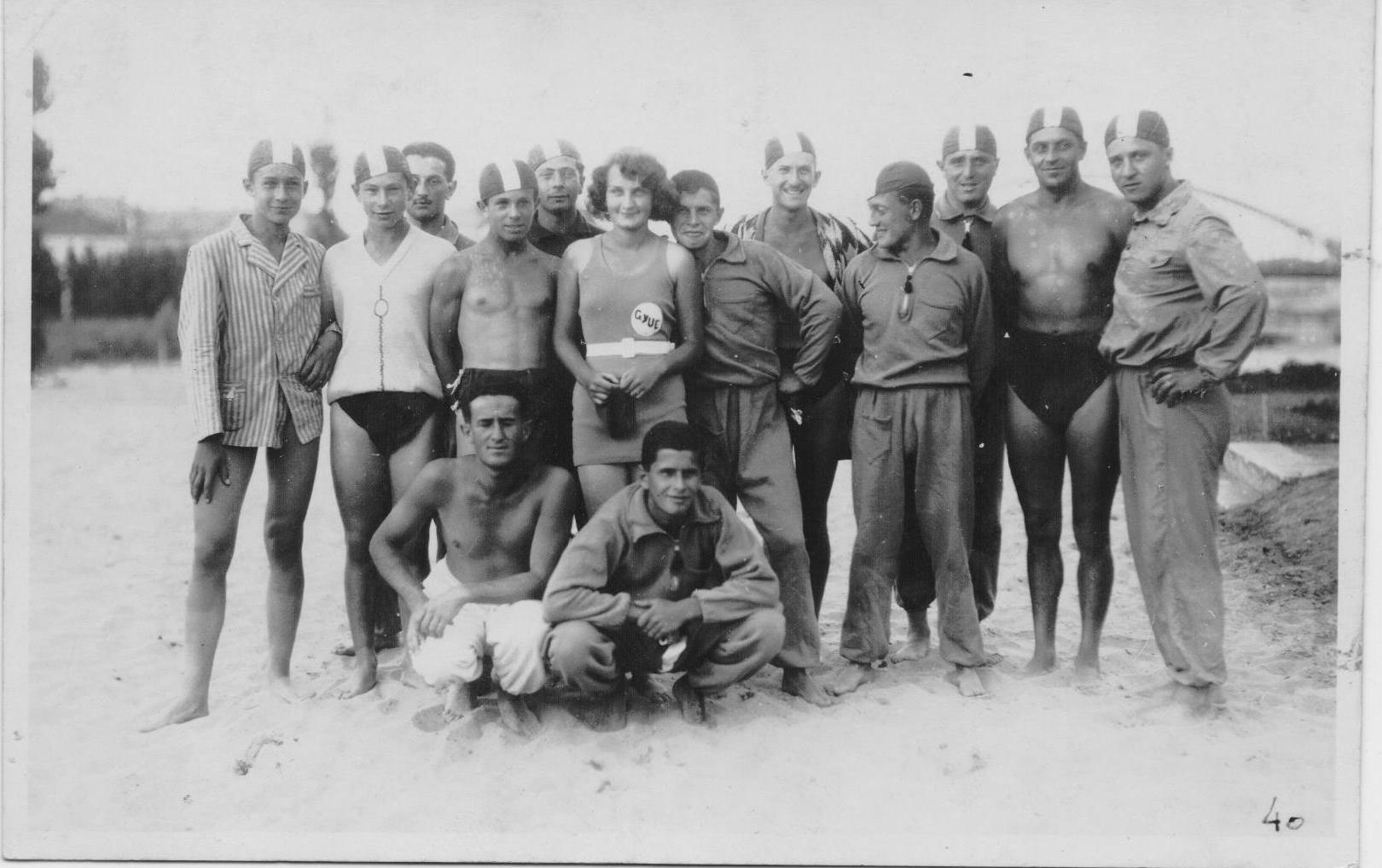 Die Geschwister Else Schön (1914–1994; verh. Rotter) und Tibor Schön (1911–1984; an ihrer linken Seite, also im Bild rechts von ihr), beide Mitglieder des ungarischen Schwimmteams, 1931 inmitten ihrer Teamkollegen.